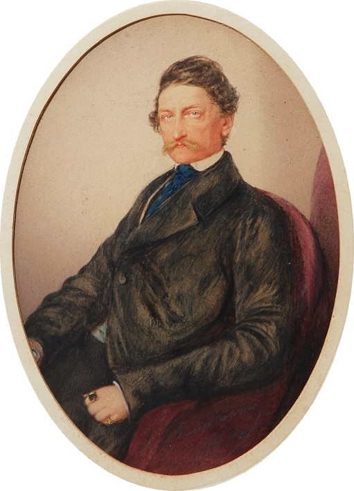 Emanuel hrabě Dubský z Třebomyslic (1806 - 1882), Moravský politik a velkostatkář.